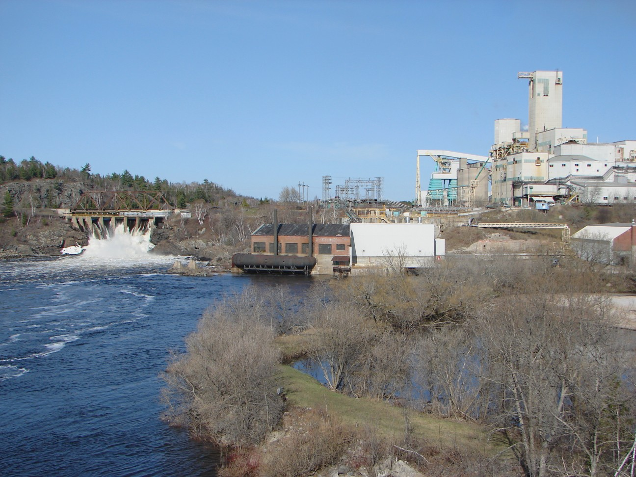 Espanola, Ontario, Canada